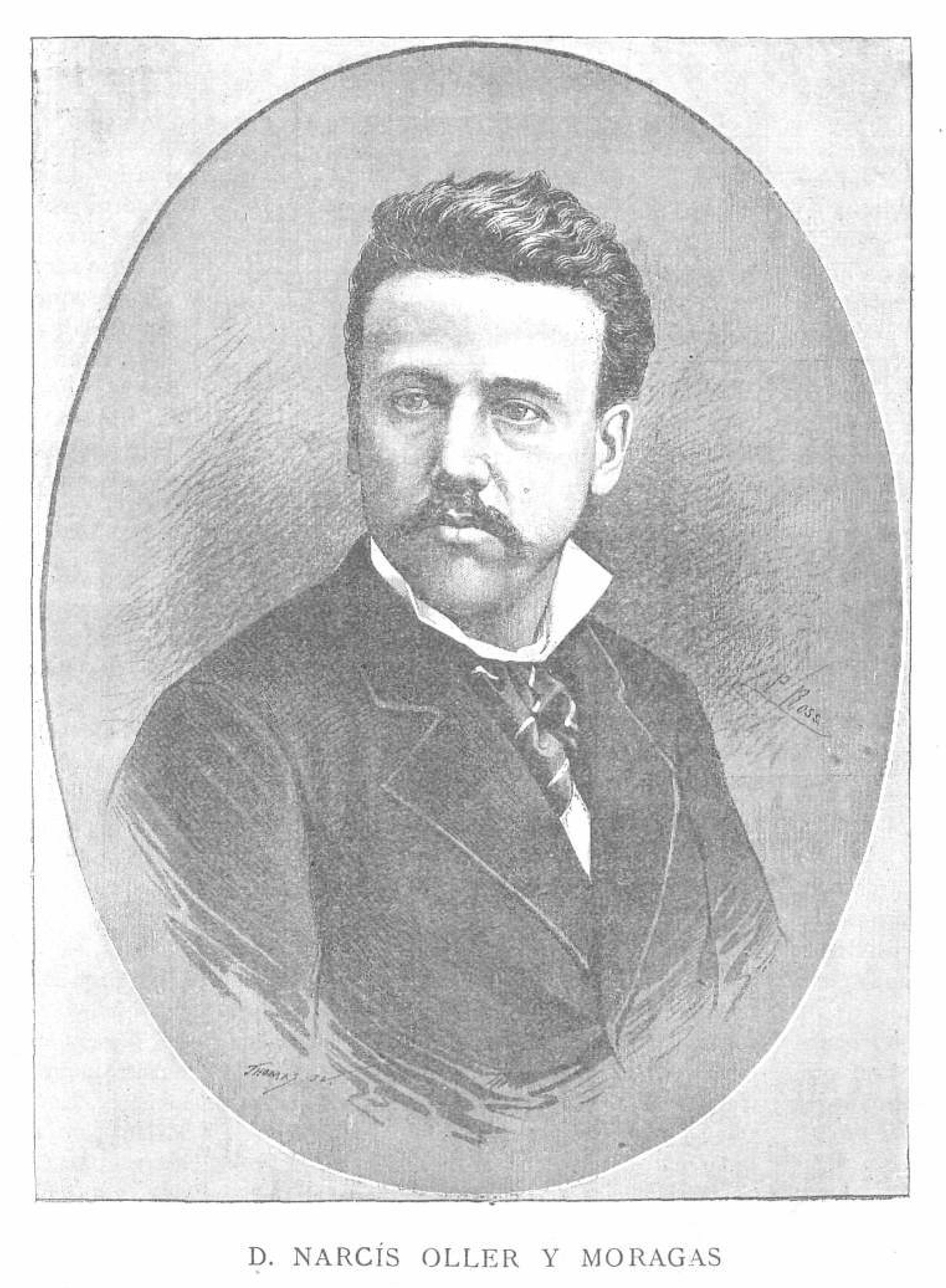 Narcís Oller y Moragas.